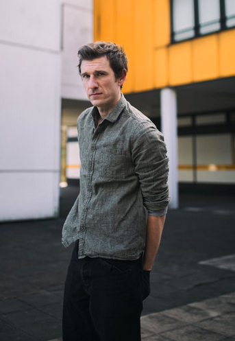 Portrait von Schauspieler Dennis Schigiol